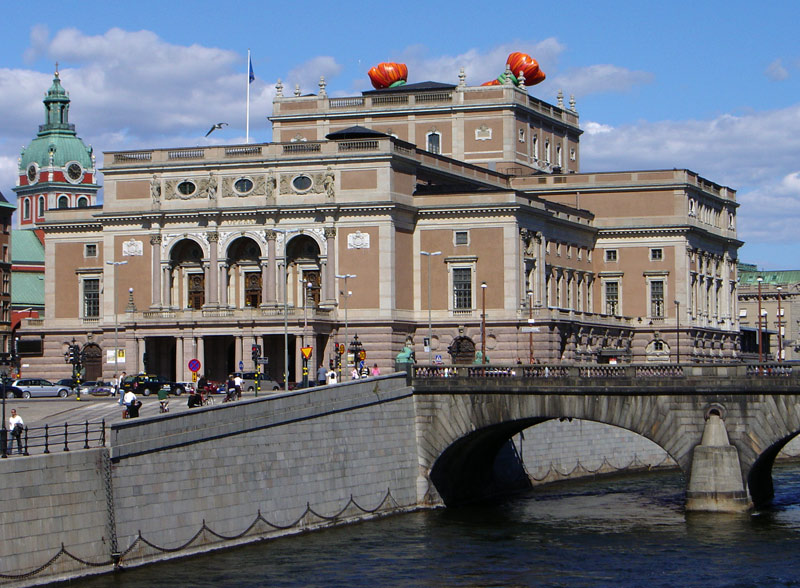 Kungliga Operans fasad mot Gustav Adolfs Torg. Bilden är tagen maj 2005 då baletten om Pippi Långstrump just haft premiär, därför sitter det pippiflätor på taket.